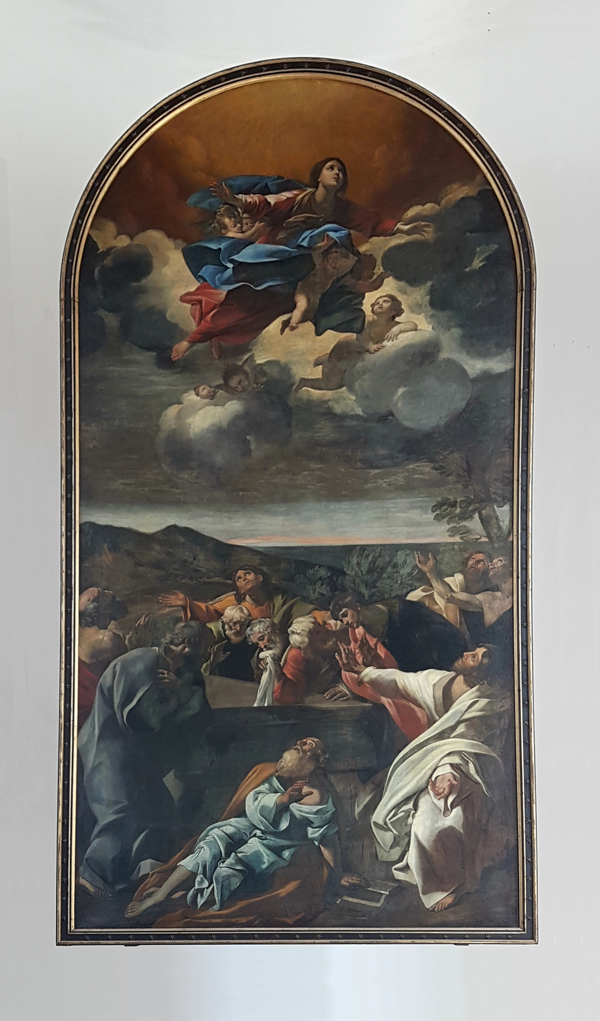 München-Nymphenburg, Christkönigkirche, frühbarockes Altarbild Mariä Himmelfahrt (Leihgabe der bayerischen Staatsgemäldesammlungen) von Giovanni Lanfranco, 1631